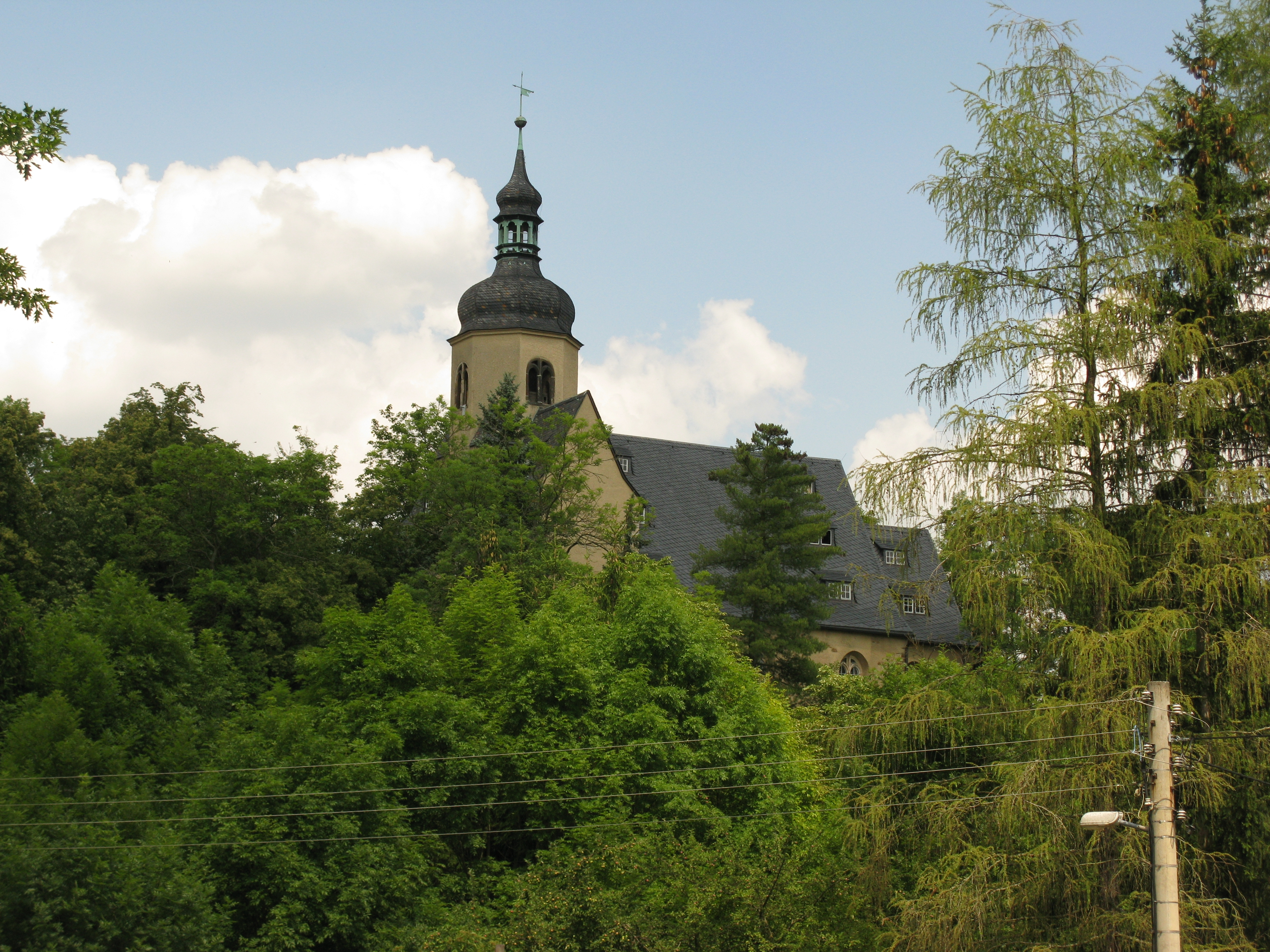 Plauen-Straßberg, denkmalgeschützte Kirche an der Hauptstraße (Hauptstraße 26).